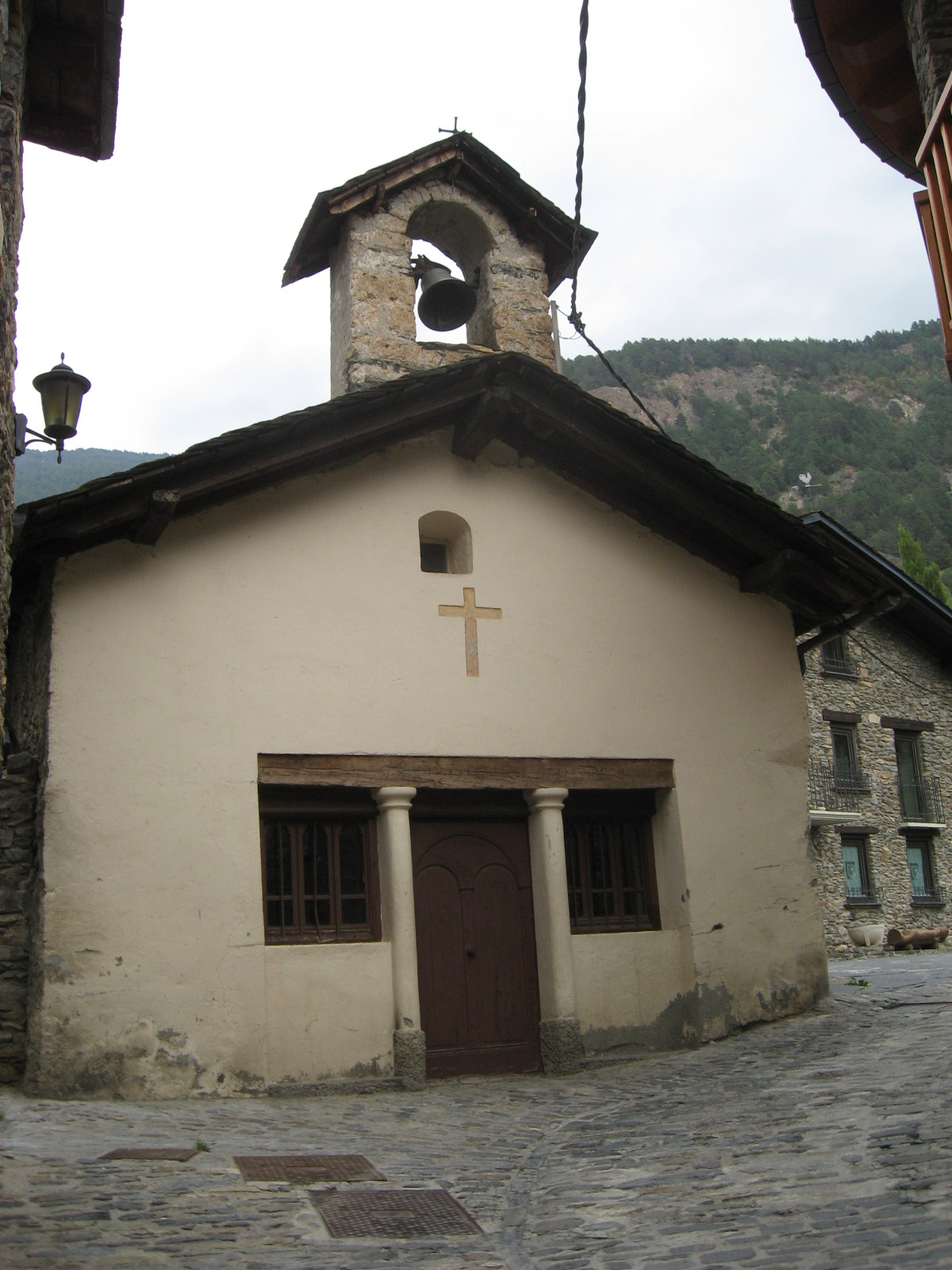 Església de Sant Roc de Sornàs